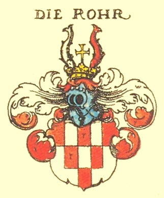 Wappen der Schlesischen Adelsfamilie Rohr und Stein.